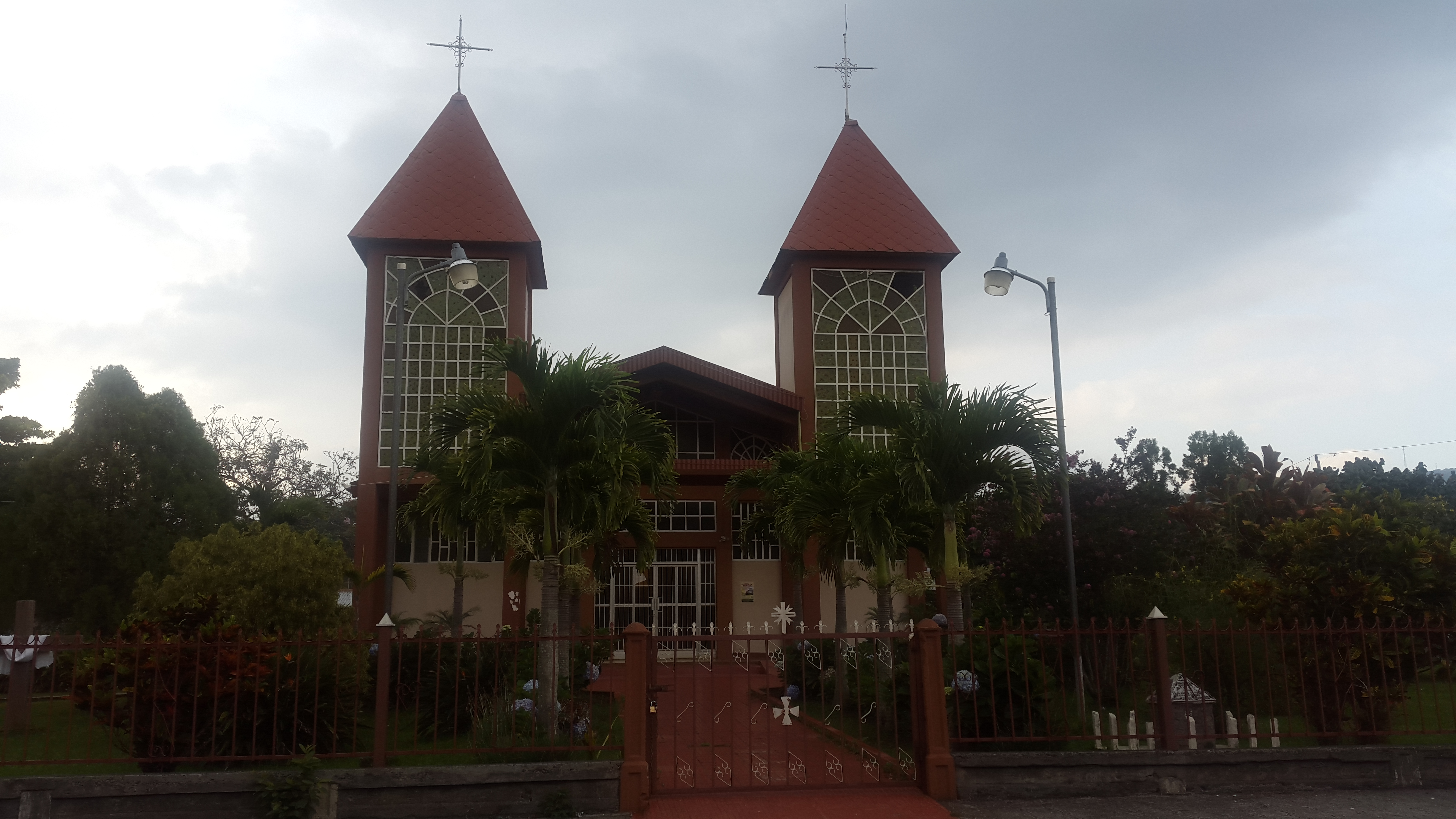 Ermita de la Virgen de la Candelaria, cantón de Naranjo, provincia de Alajuela, Costa Rica.